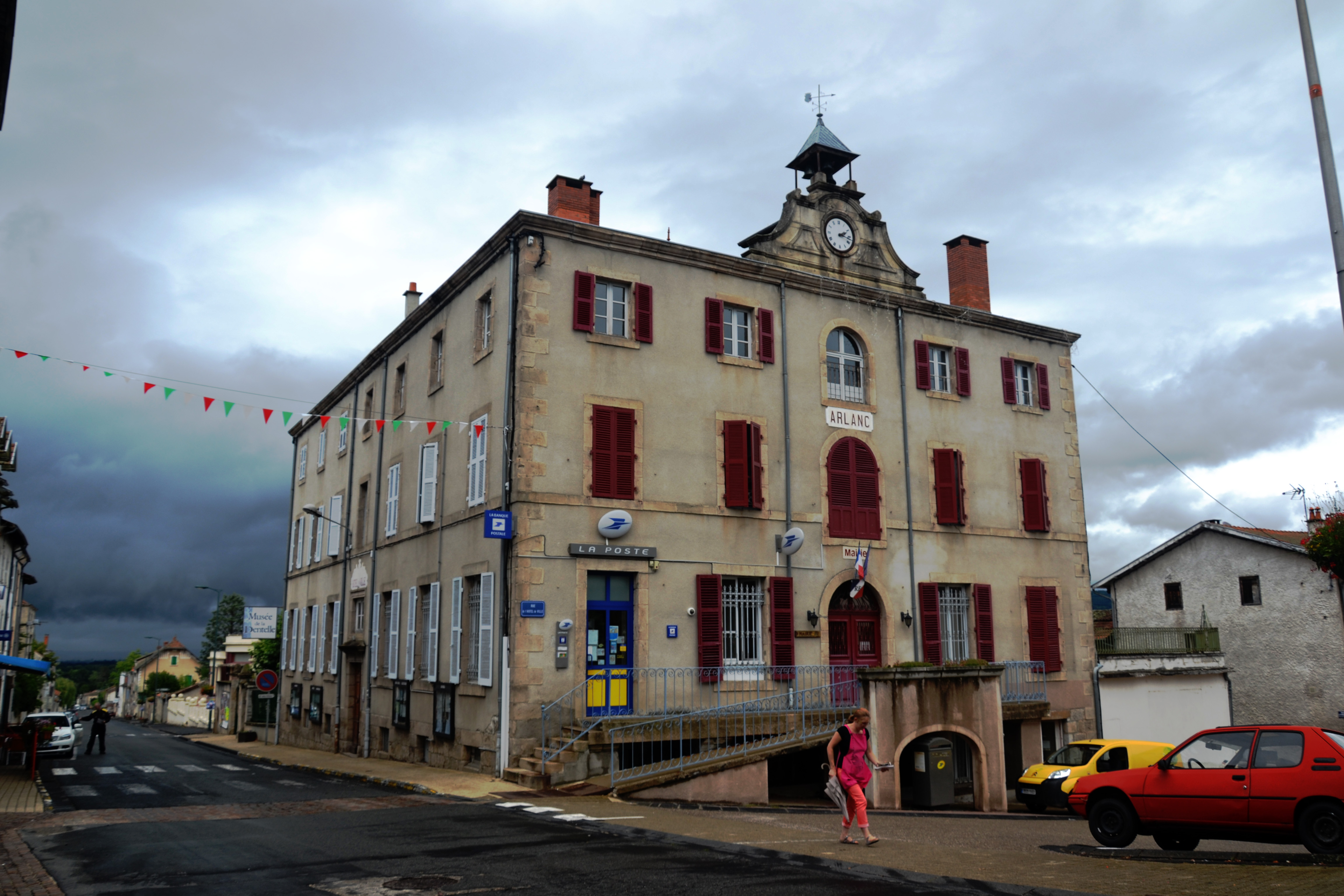 Hôtel de Ville